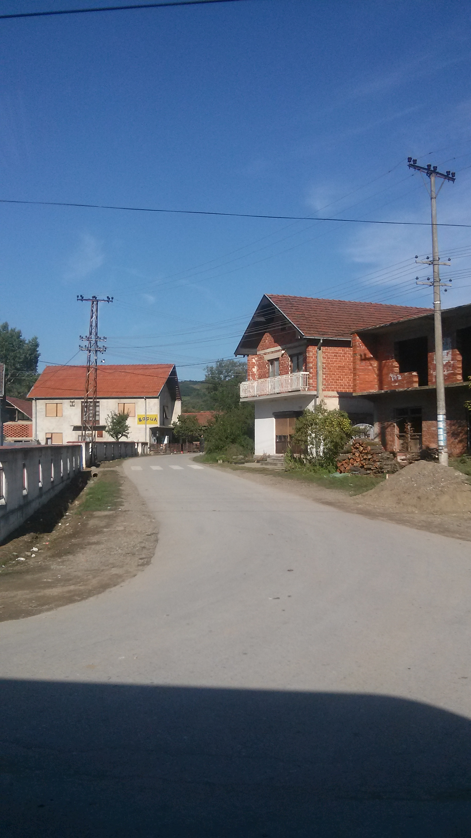 Srpski (latinica): Boljare, Vlasotince